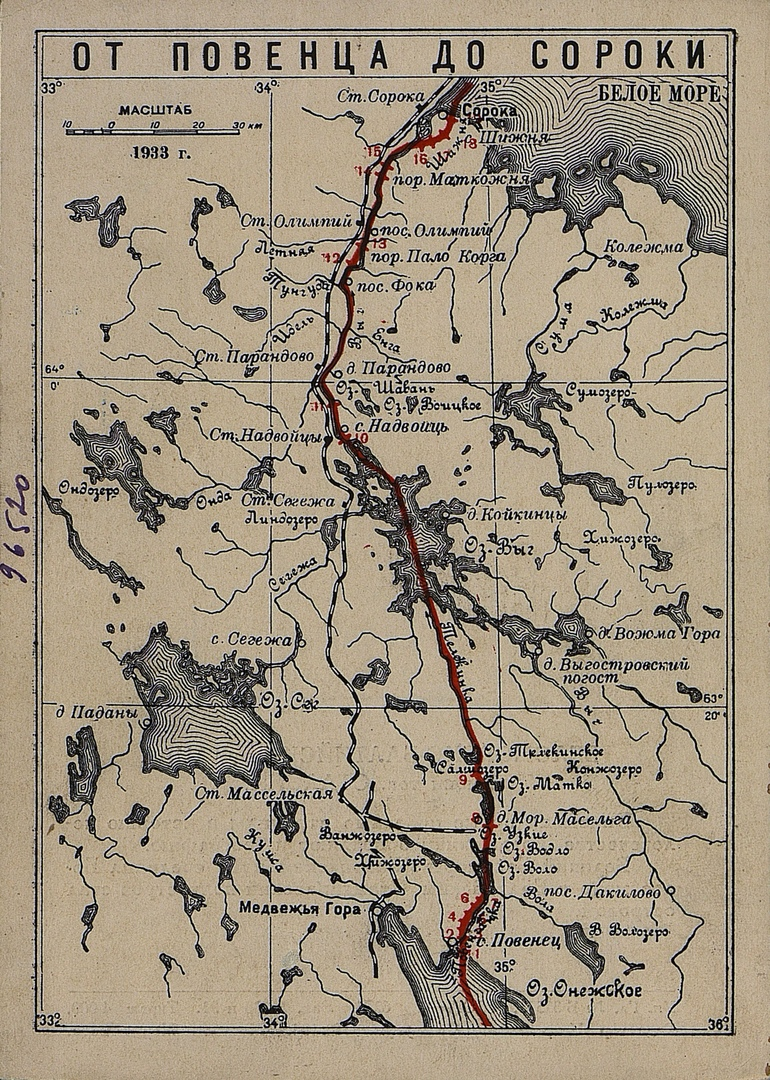 Ст. Парандово на схеме, 1933 год.